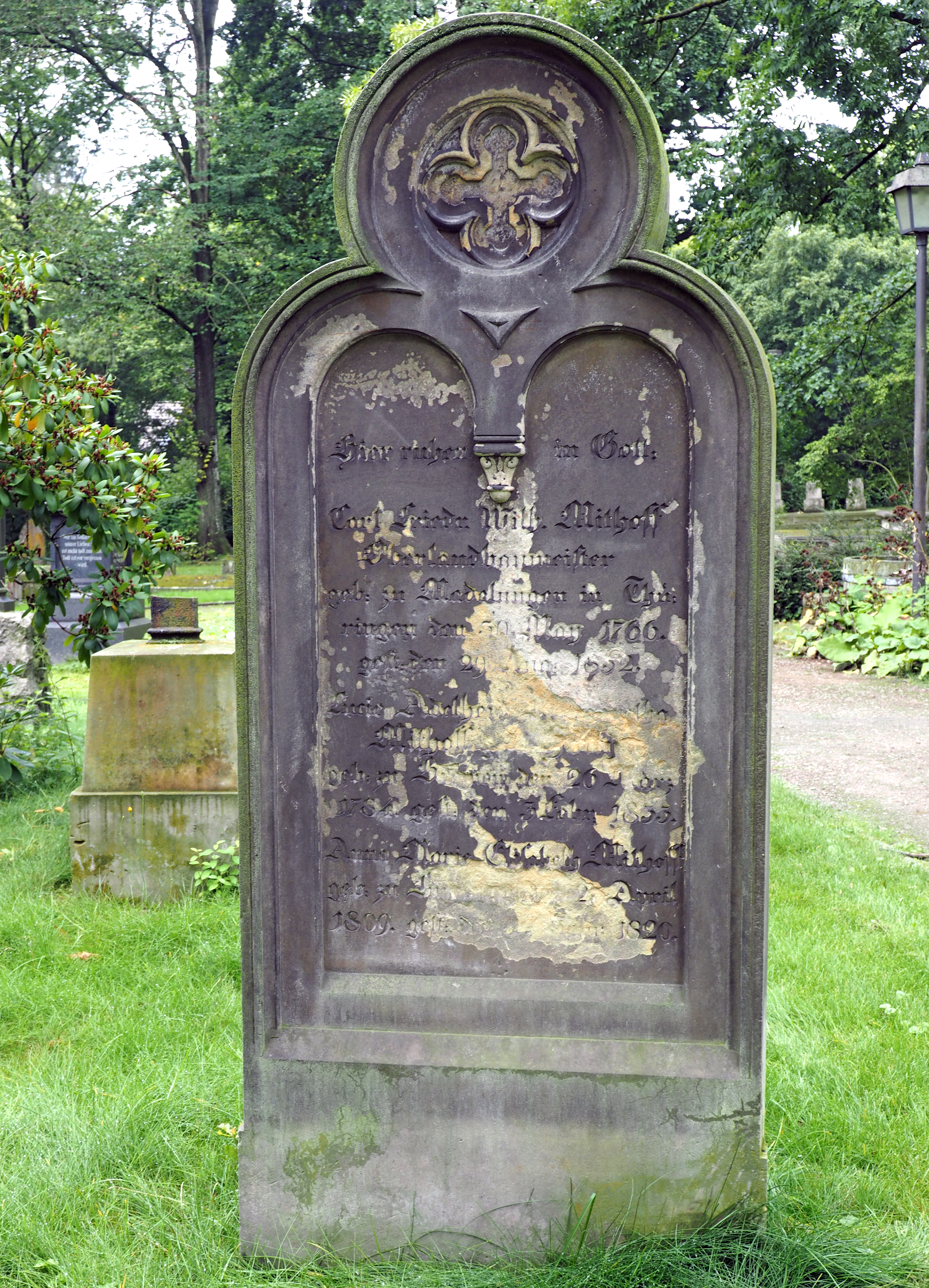 Grabmal des Oberlandbaumeisters Carl Friedr. Wilh. Mithoff auf dem Helentorfriedhof, östlicher Teil, in Celle